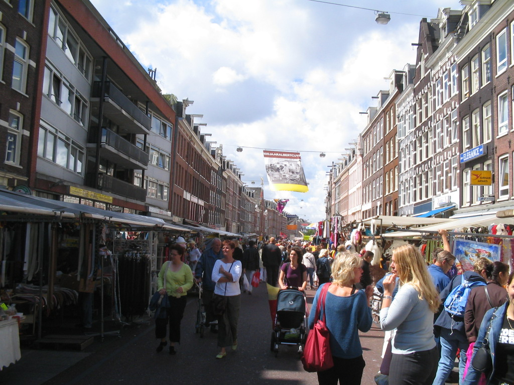 Albert Cuypmarkt, Amsterdam, augustus 2005